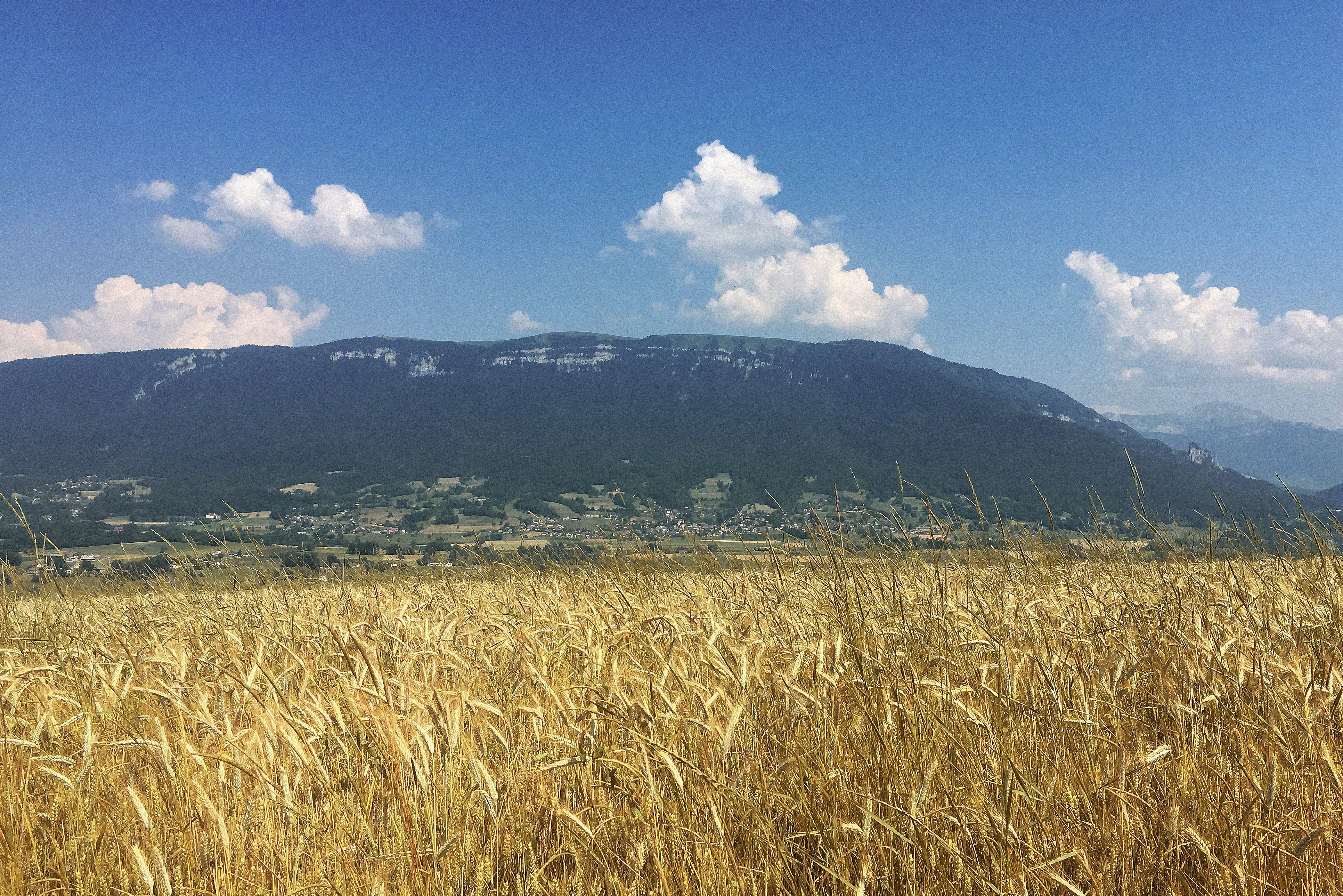 Vue sur le Semnoz, les Tours St.Jacques, la Montagne du Charbon, et le Trélod depuis un champ de blé au sommet de la colline d'Hery-sur-Alby dans la plaine de l'Albanais (Haute-Savoie).